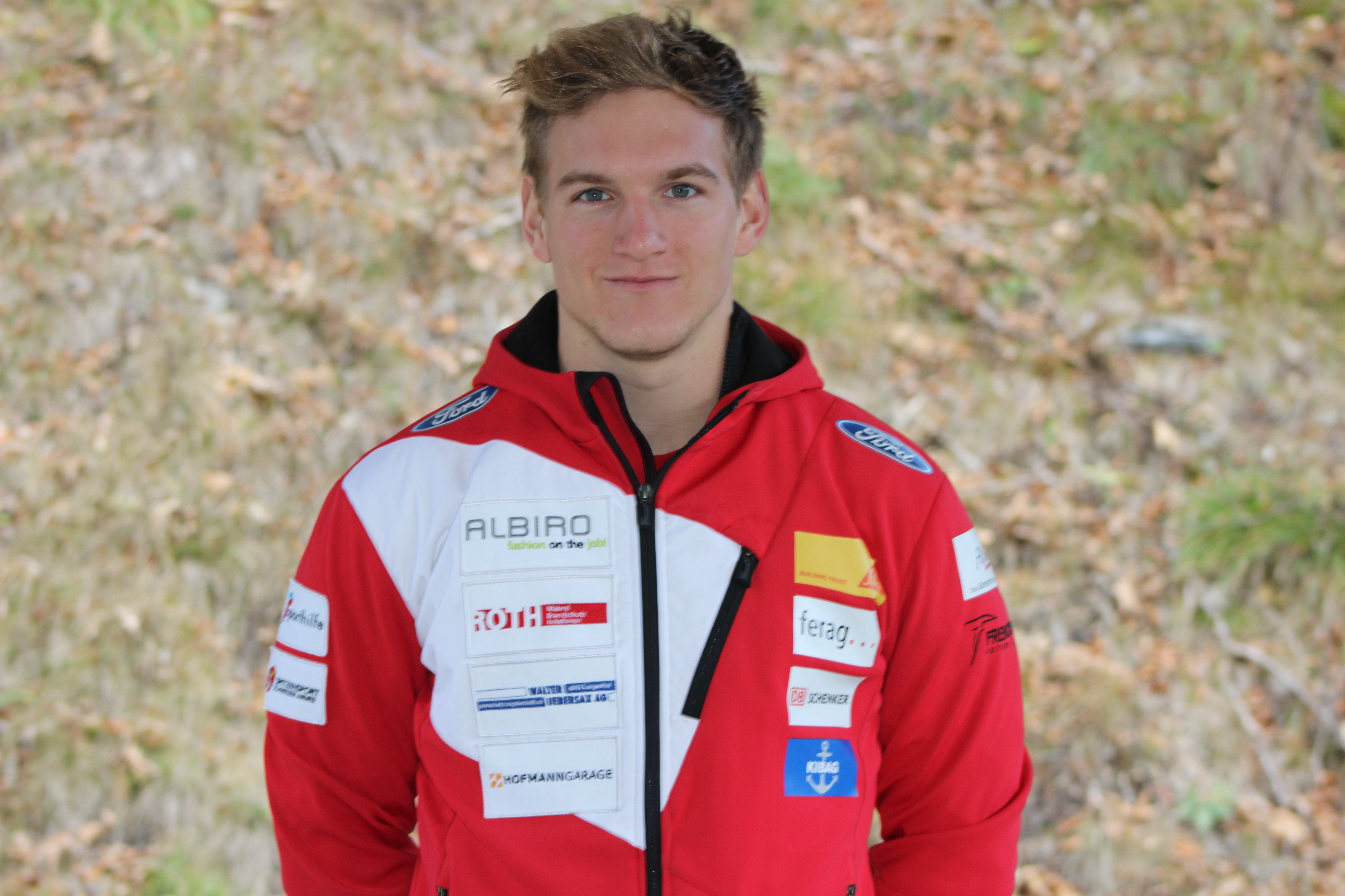 Portraitbild Königssee